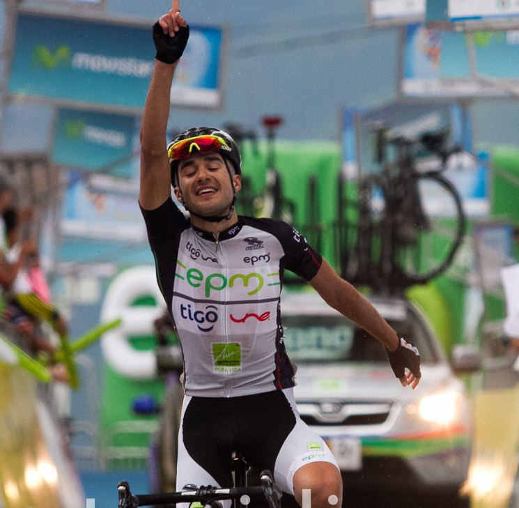 Eta11. Vuelta a Colombia 2015 - Jueves 13 de agosto de 2015. Donmatias - Ituango (146,7Kms)